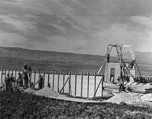 דפנה - העליה לדפנה בעמק החולה